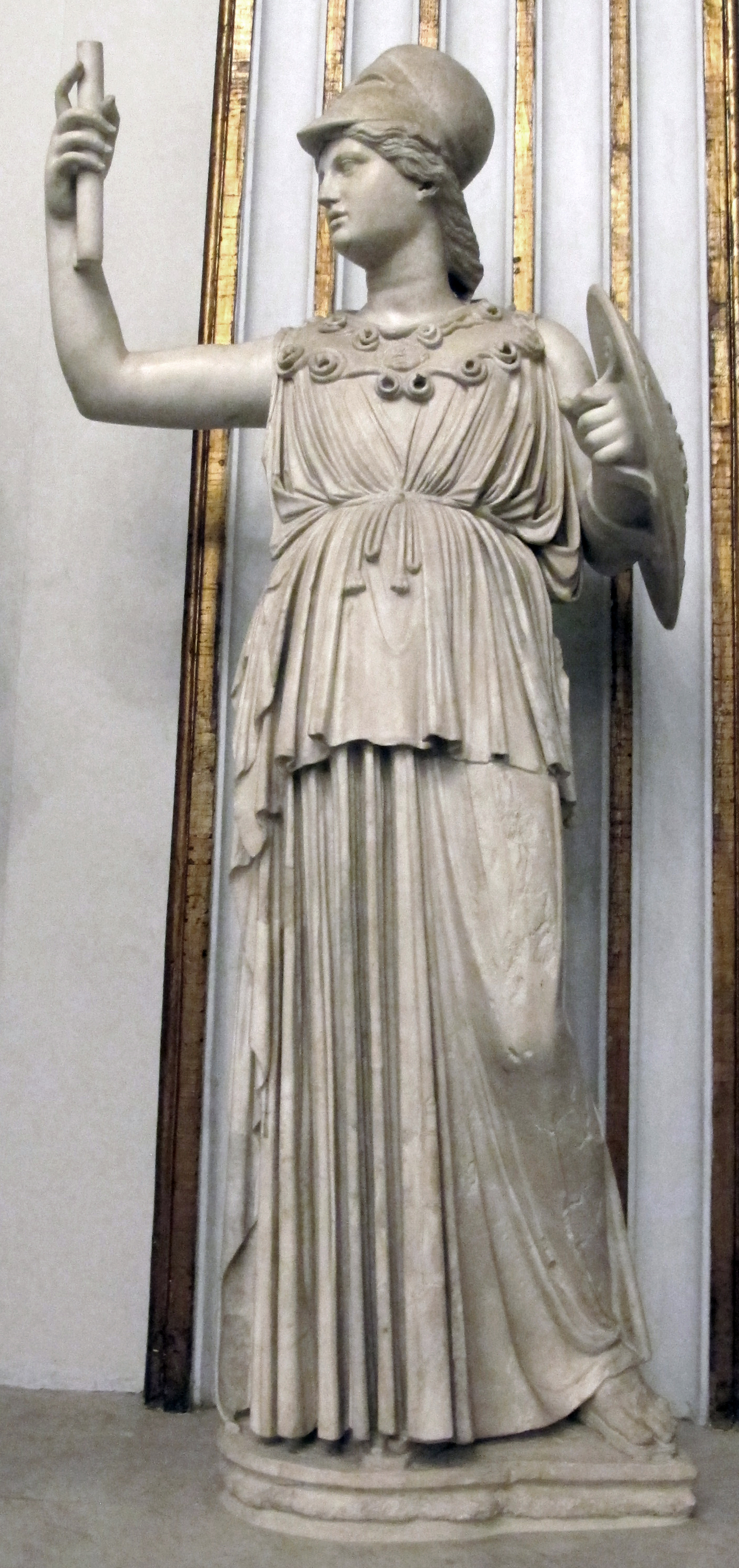 Musei Capitolini, Atena da Anzio. Inventario Sculture S 629